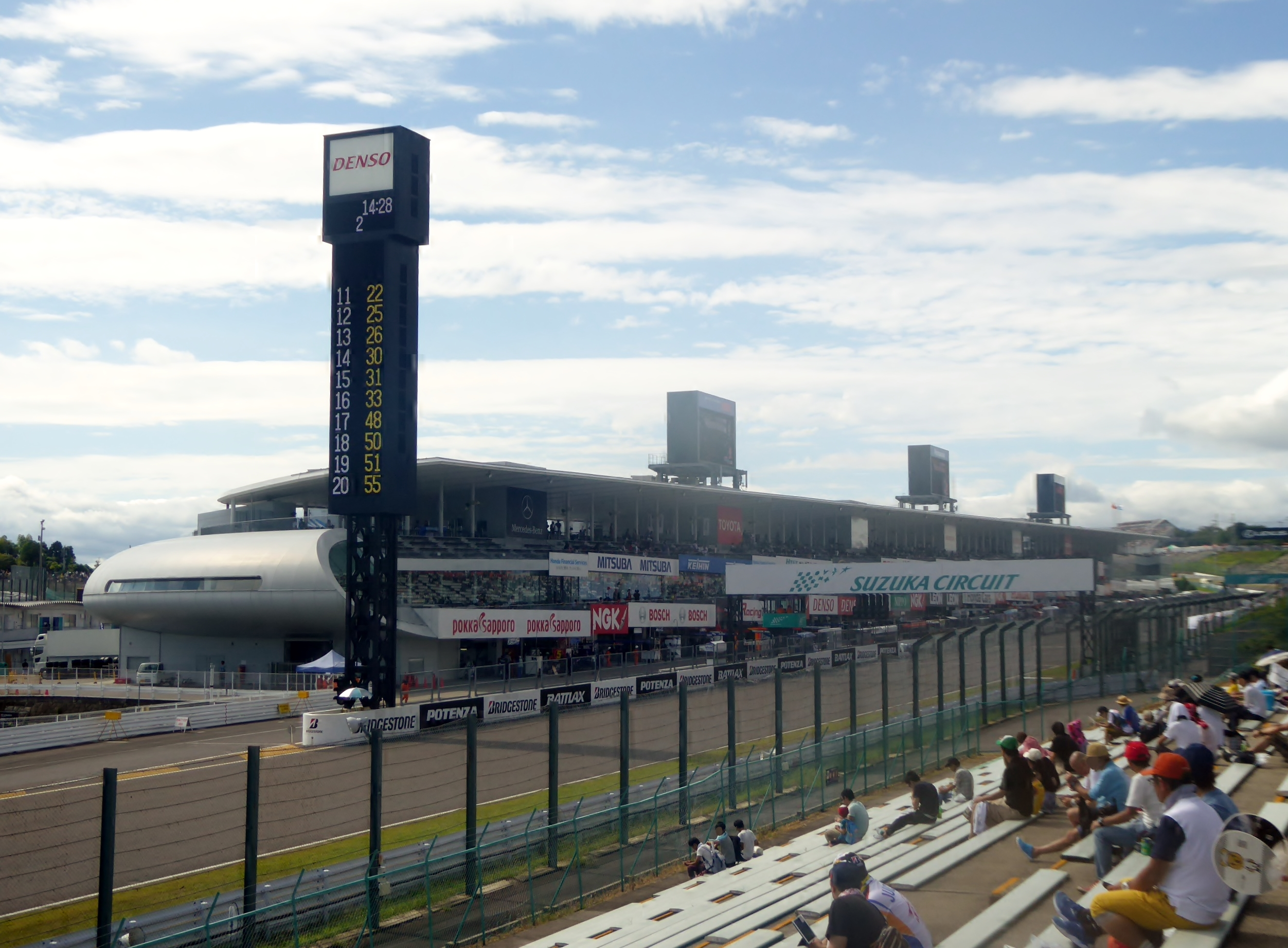 鈴鹿サーキットのピットのある建物を撮影。